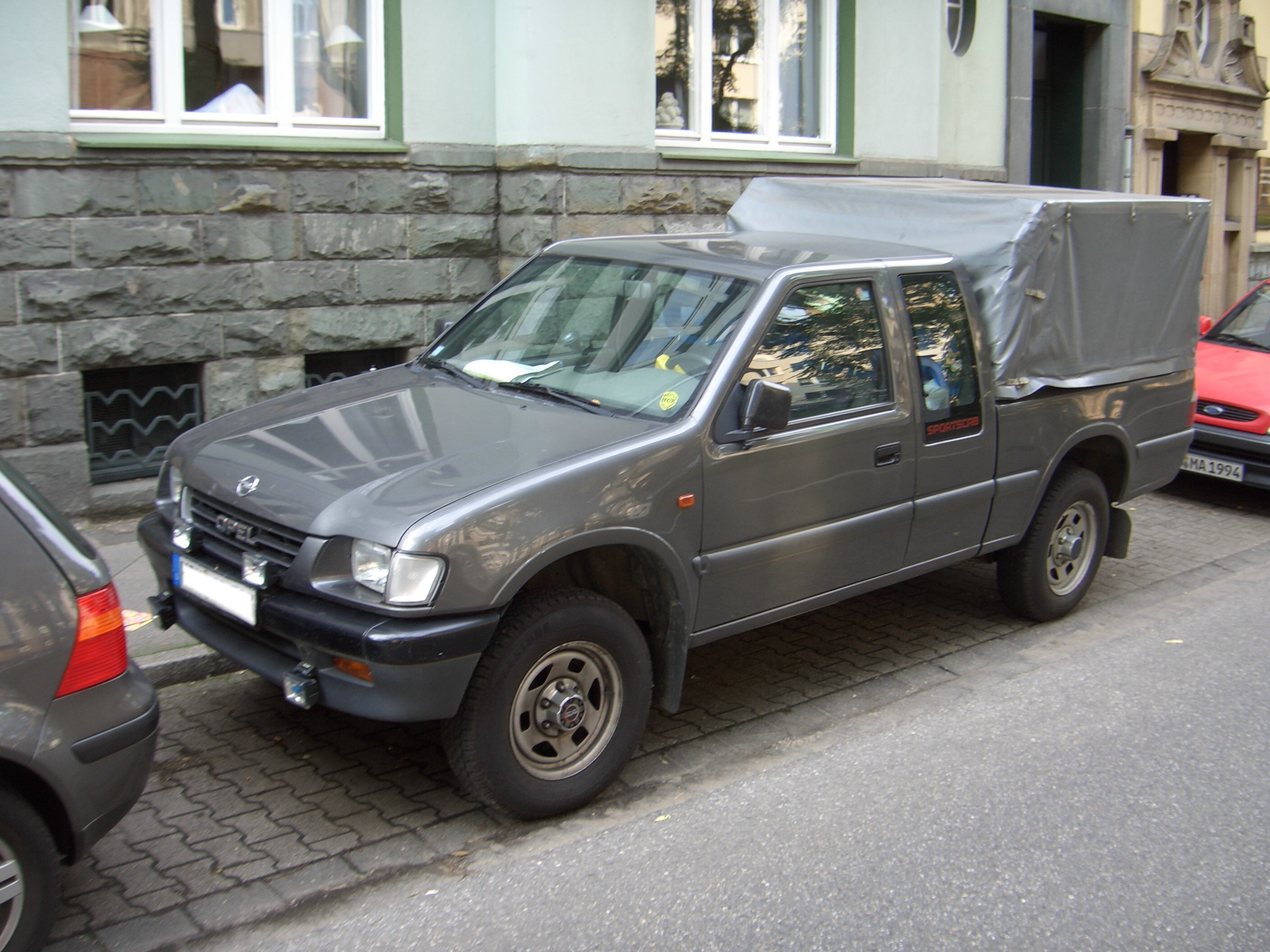 Opel Campo TDS 4x4 Sportscab, 1992-2001